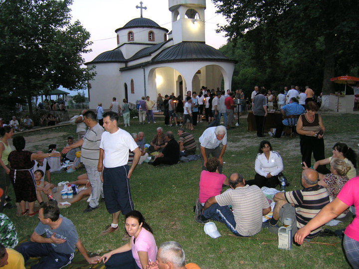 Црква Свети Илија Струмица